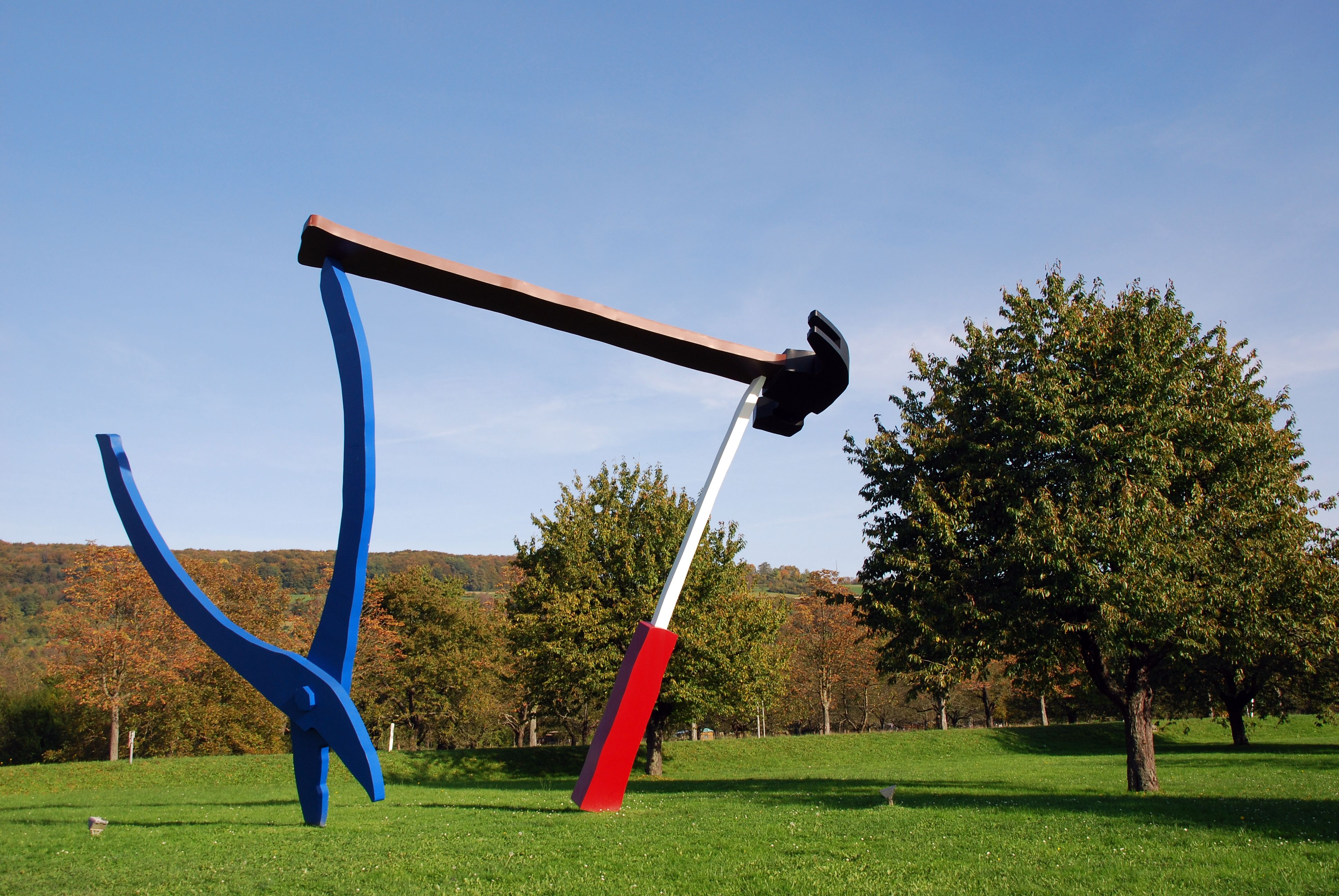 Claes Oldenburg and Coosje van Bruggen Balancing Tools, 1984 Steel painted with polyurethane enamel 26 ft. 3 in. x 29 ft. 6 in. x 19 ft. 10 in. (8 x 9 x 6.1 m) Vitra International AG, Weil am Rhein, Germany Copyright 1984 Claes Oldenburg and Coosje van Bruggen